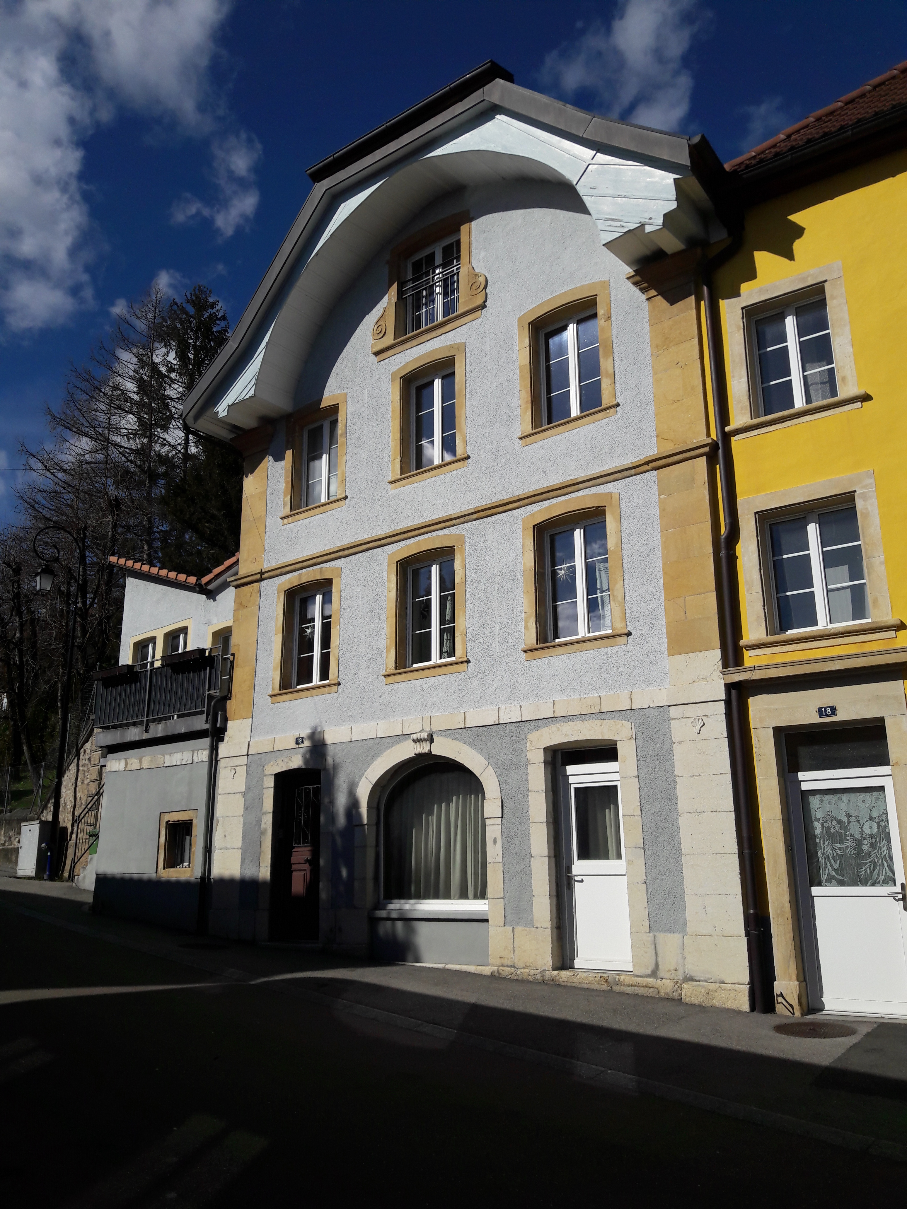 Photographie en couleurs d'une maison